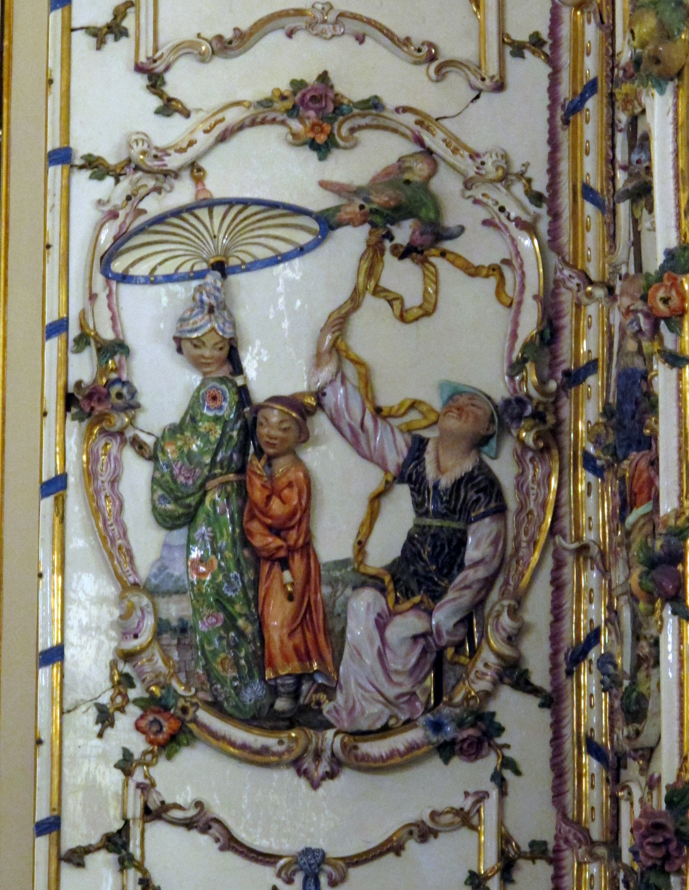 Appartamento Reale (Museo di Capodimonte)